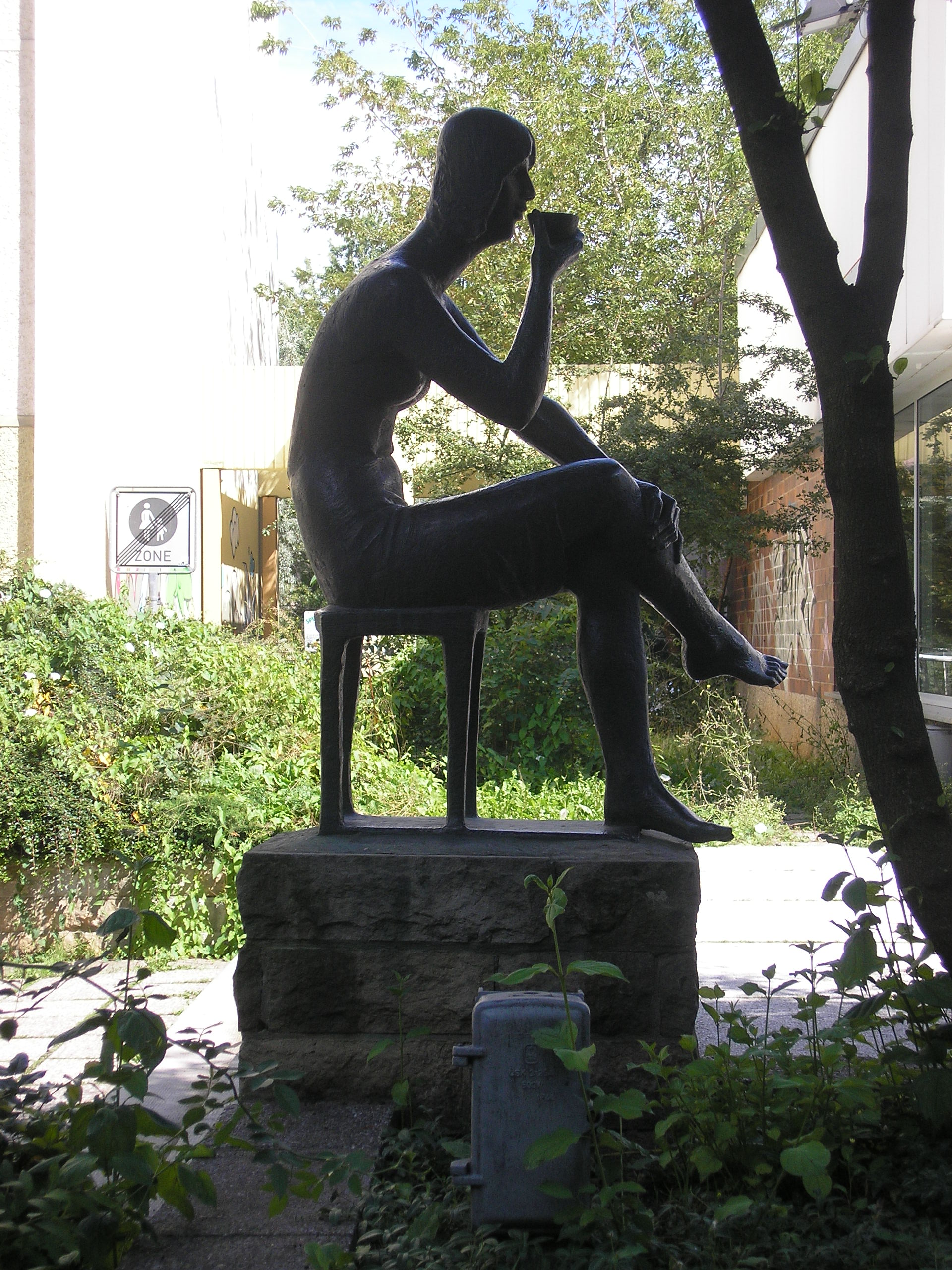 Skulpturen wie diese wurden im Fußgängerbereich des Plattenbaugebietes Berliner Platz in Erfurt-Nord aufgestellt.